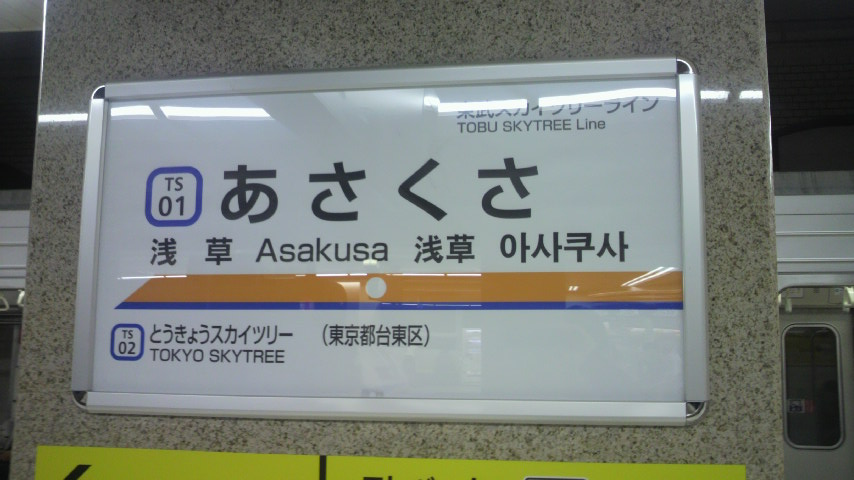 東武浅草駅駅名標